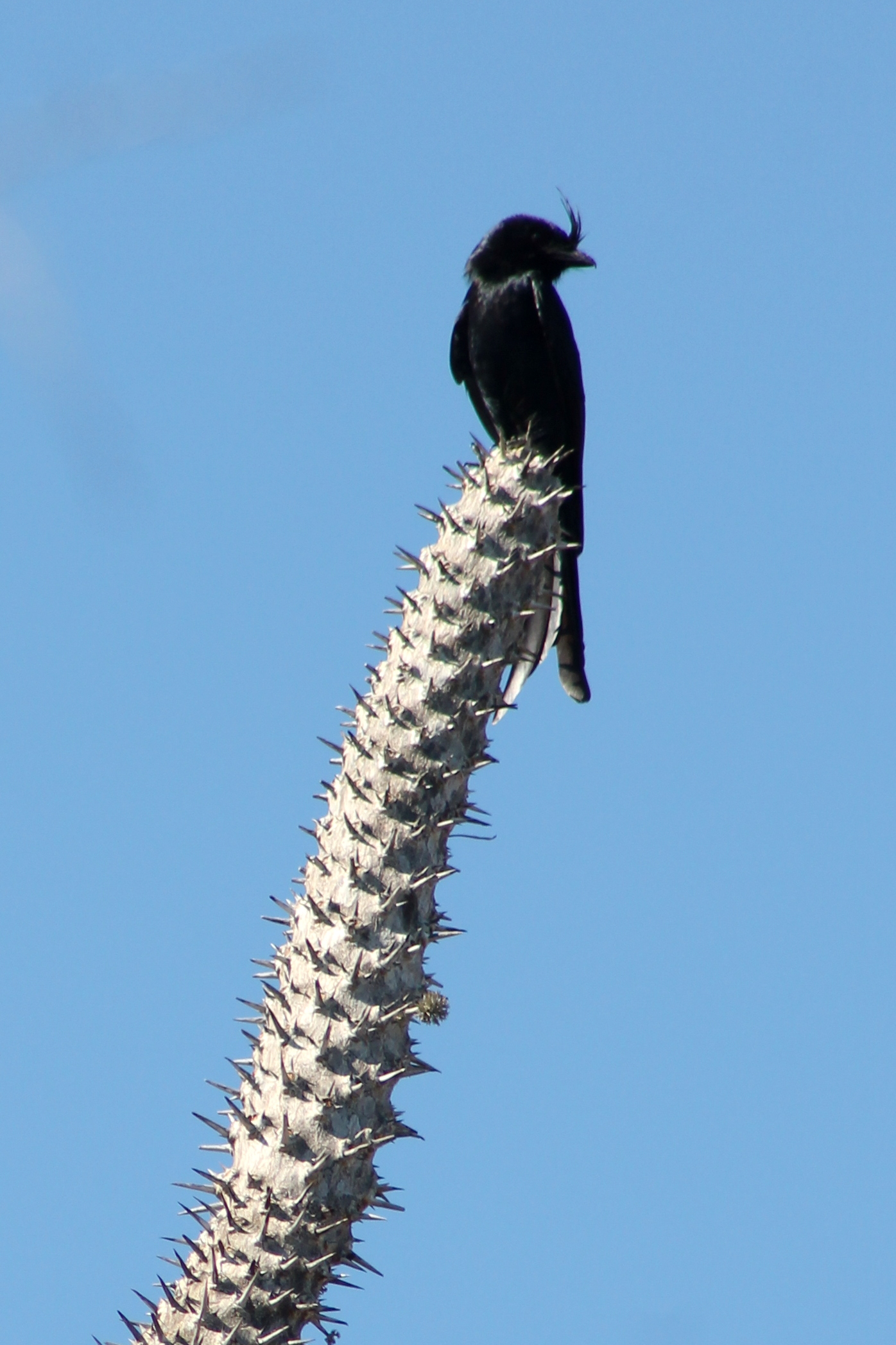 Kuifdrongo in Reniala